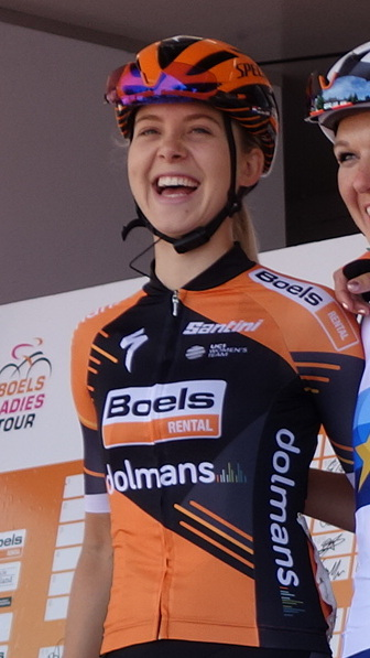 Jip van den Bos (Boels Dolmans) bij de start van de eerste etappe van Stramproy naar Weert in de Boels Ladies Tour 2019